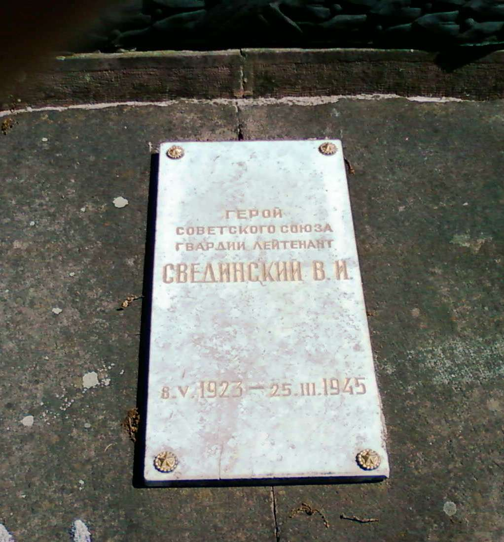 Могила Героя Советского Союза Свидинского Владимира Ивановича на Холме Славы во Львове